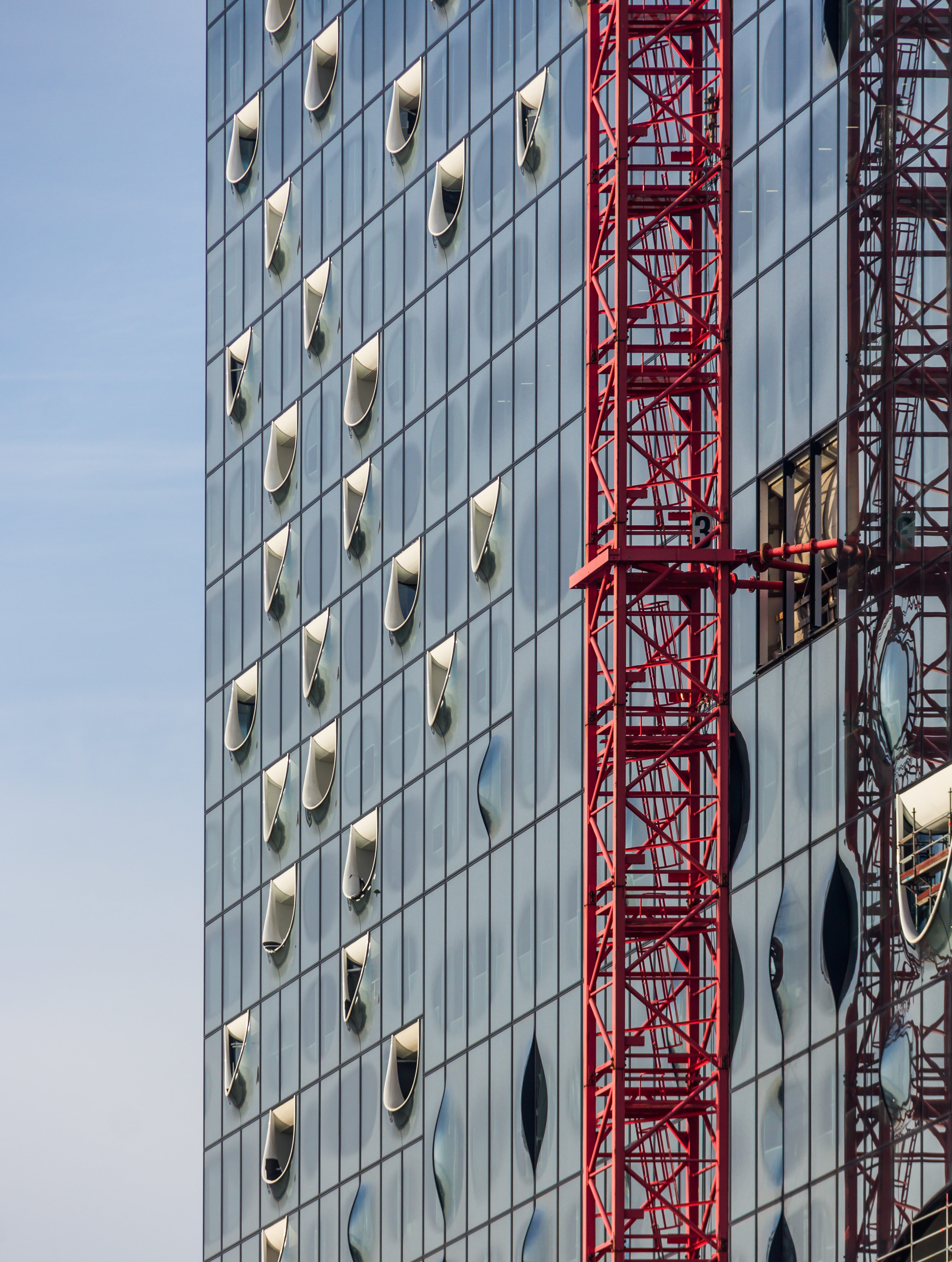 Elbphilharmonie, Februar 2015. Teilansicht der Fassade mit montiertem Baukran